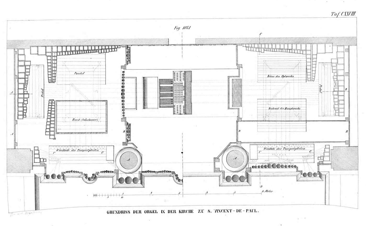 Tafel aus Johann Gottlob Töpfer: Atlas zum Lehrbuch der Orgelbaukunst, Weimar 1855Tafel 128, Grundriss der Orgel in der Kirche zu St. Vincent-de-Paul